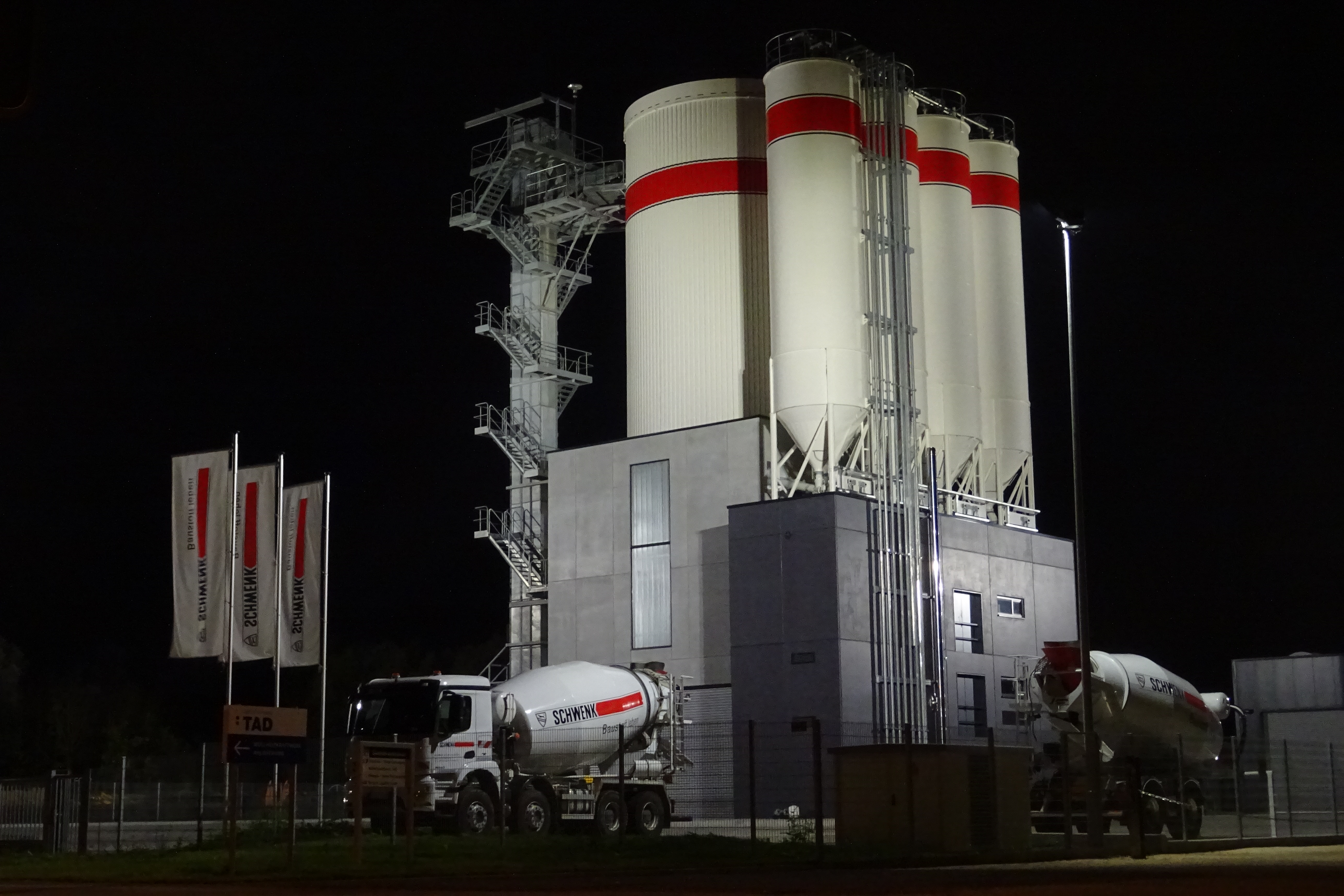 Betonmischanlage Schwenk, Siemensstraße Ulm